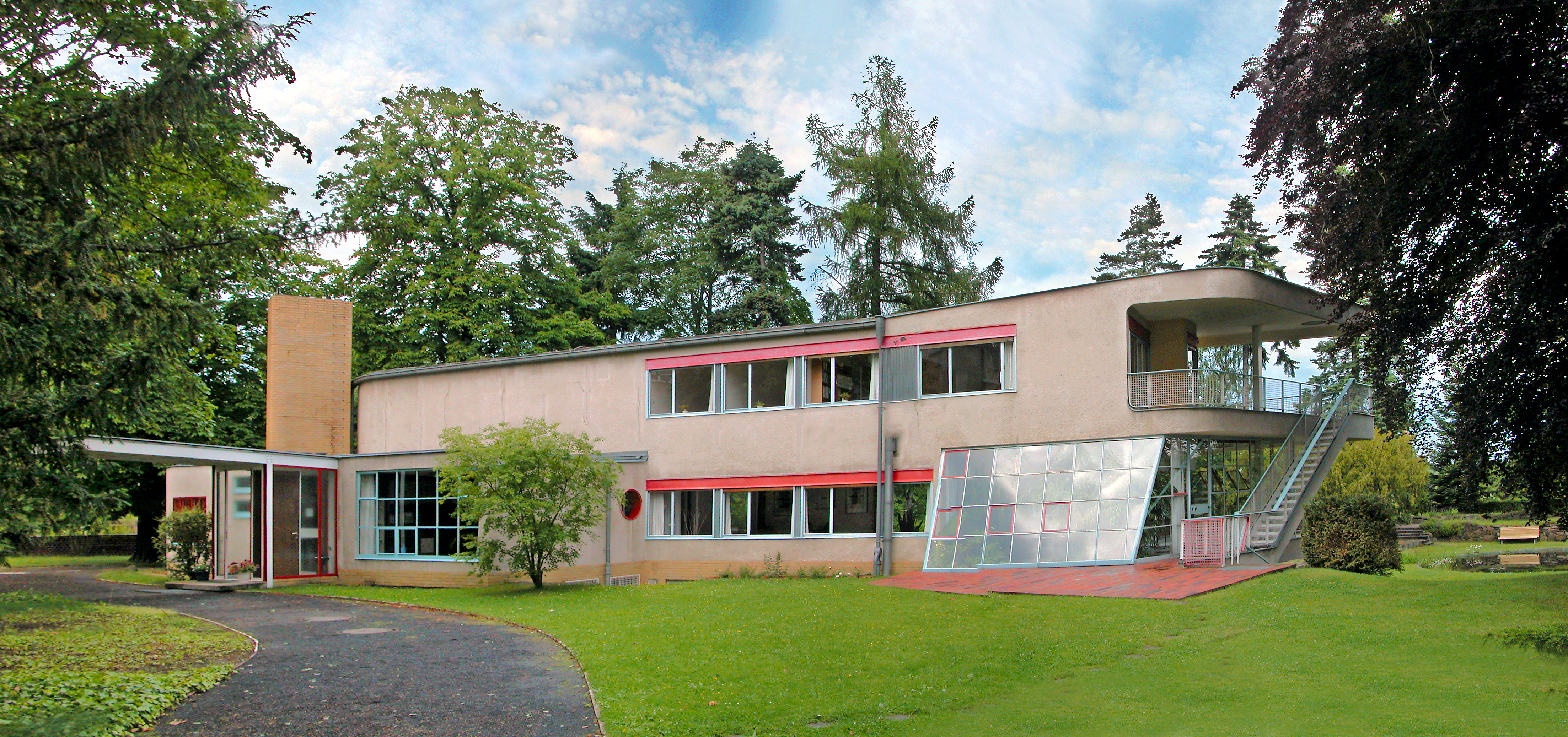 10.04.1988 8700 [02708] Löbau, Kirschallee 1: Villa Schminke (Architekten Hans Scharoun 1930-1933). 1946: Charlotte Schminke eröffnet nach Rückgabe des Hauses ein Erholungsheim für Kinder bombengeschädigter Familien aus Dresden. 1951: Die Stadt Löbau pachtet das Haus und richtet ein Klubhaus für die FDJ ein. 1963: Das "Haus der Pioniere wird eingerichtet. August 1990 bis August 1993: Nach Auflösung des Pionierhauses betreibt die Stadt ein Freizeitzentrum für Kinder und Jugendliche, bis 2005 führt dies der Verein "Haus Schminke" weiter. Ab Februar 2006 betreibt die Stadt das Haus wieder selbst. Als Leitbau der Moderne ist es öffentlich zugänglich. [DSCNn4024-4025]20120609100MDR.JPG(c)Blobelt